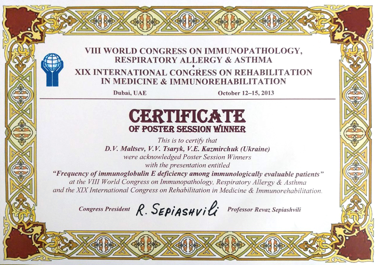 Постерна доповідь з вибіркового дефіциту IgE стала переможцем конкурсу доповідей на міжнародному конгресі з імунології у Дубаї в 2013 році. Дані, наведені у доповіді спонукали ізраїльських вчених провести масштабне популяційне дослідження з вивчення зазначеного імунодефіциту.